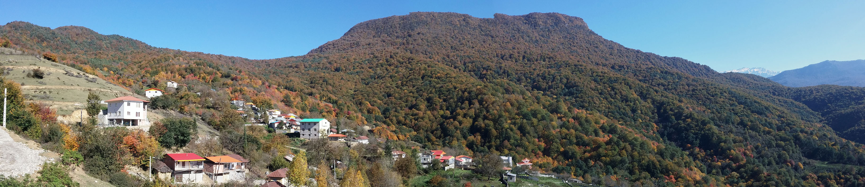 تصویر پانورما از روستای ازآنده